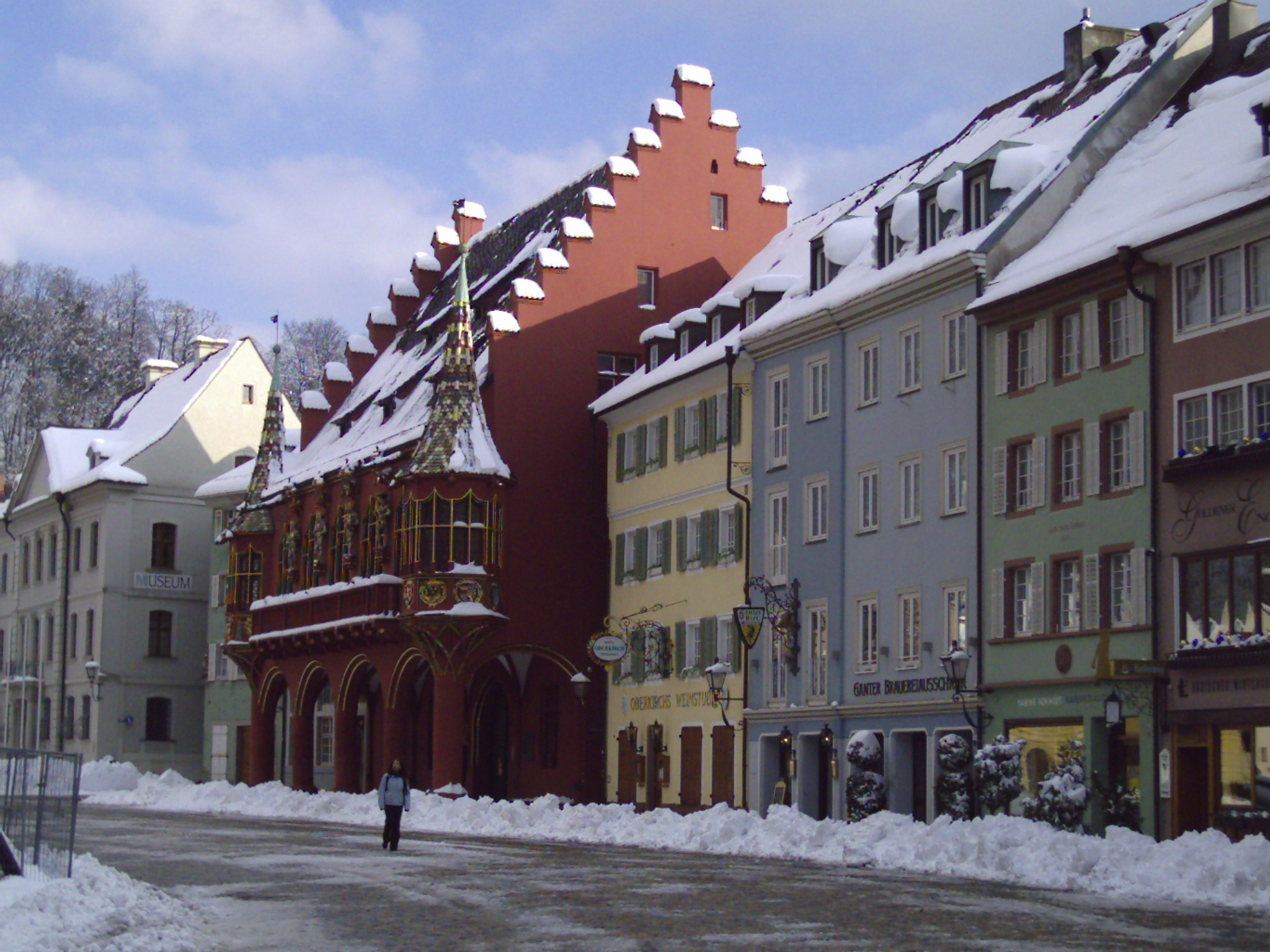 Historisches Kaufhaus at the Münsterplatz in Freiburg i. Br. (Germany) 5. March 2006